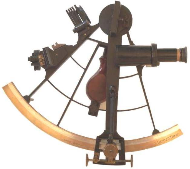 Photographie d'un ancien sextant (1900), instrument destiné à mesurer la hauteur angulaire d'un astre au-dessus de l'horizon en vue de calculer un point astronomique (latitude, longitude). Je suis l'auteur de cette photographie, le sextant m'appartient.